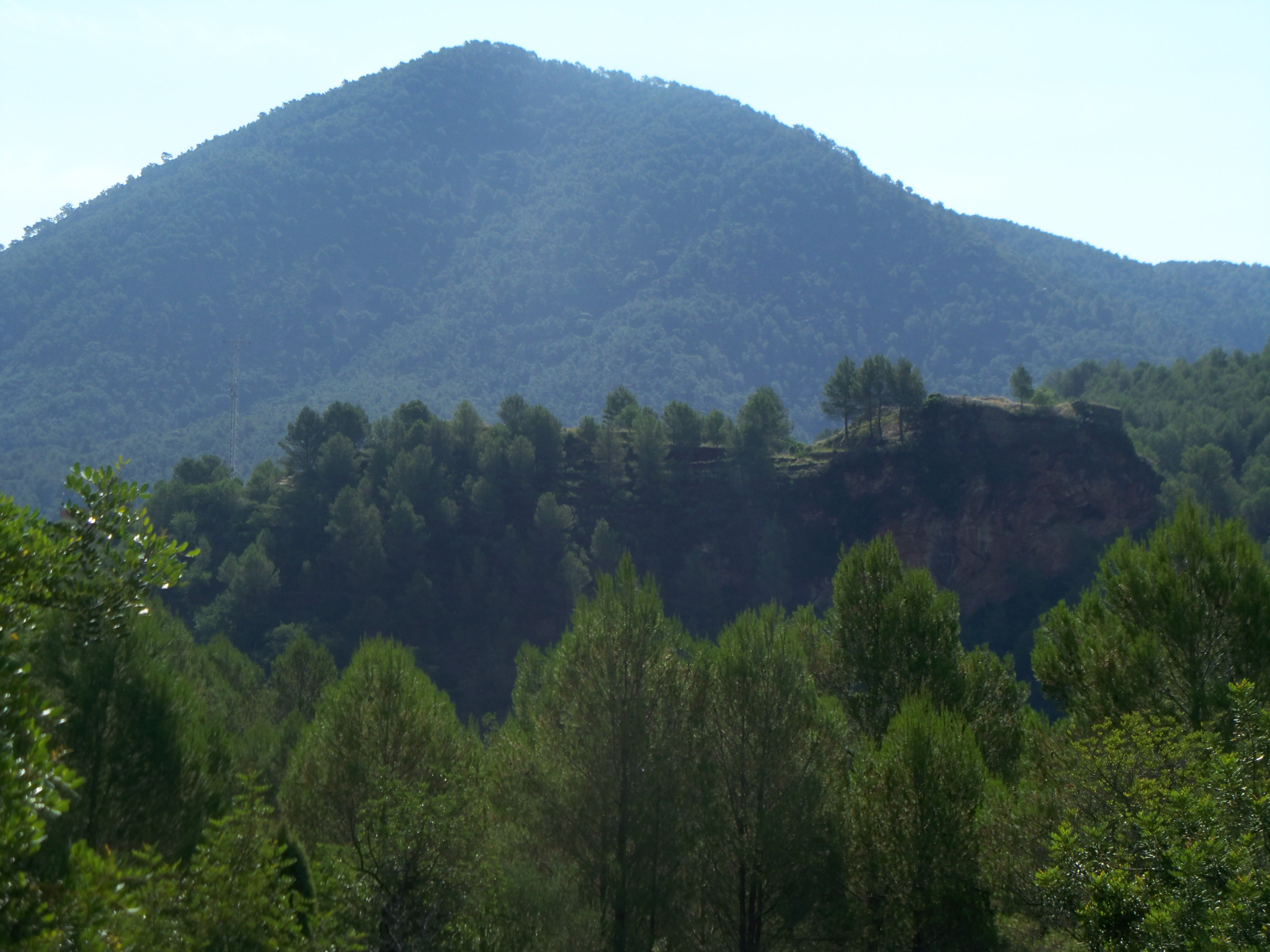 Vista del Castillo de Tales desde la partida municipal de Entre-rius